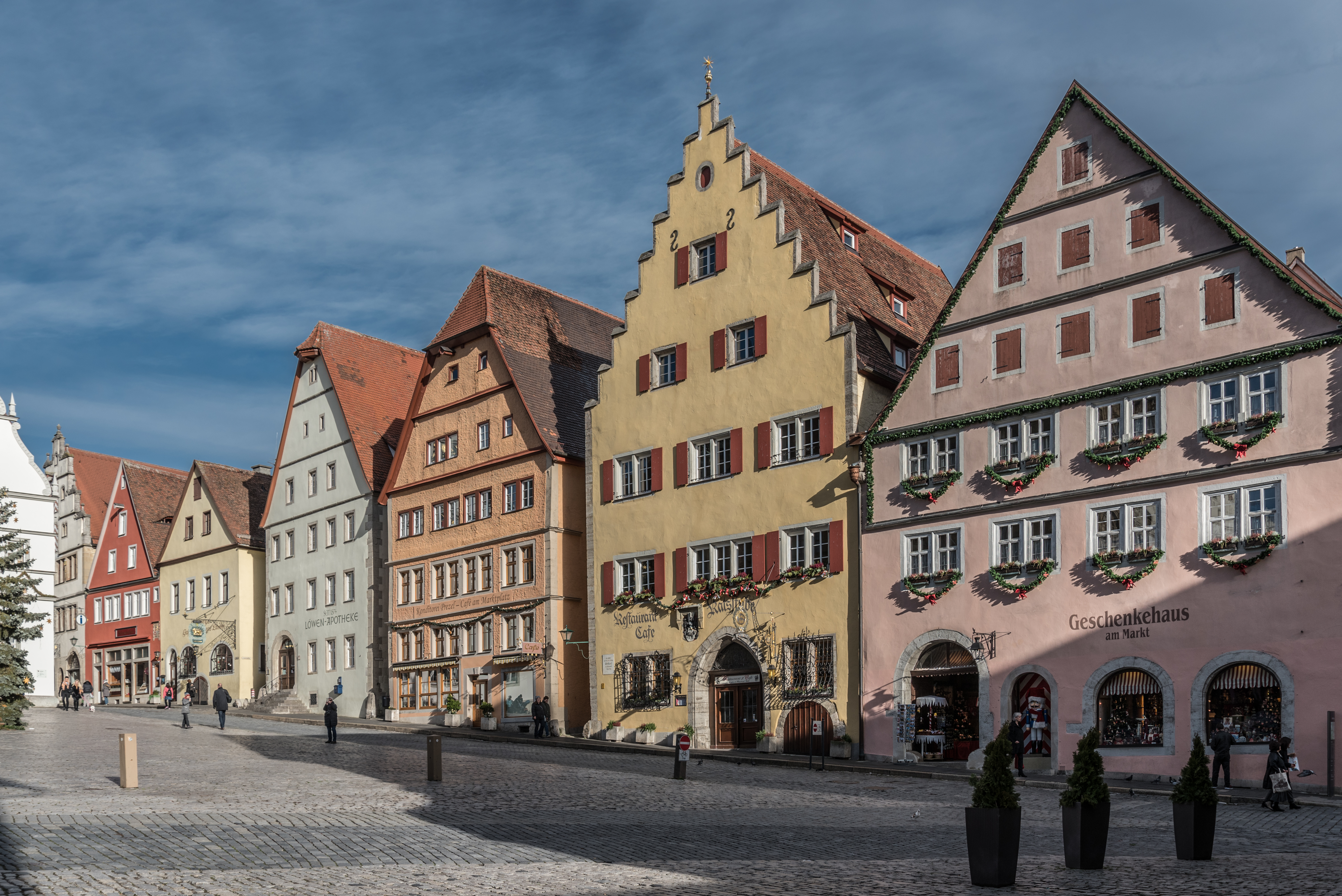 Rothenburg ob der Tauber, Markt 4, 2, Marktplatz 3, 4, 5, 6, 7